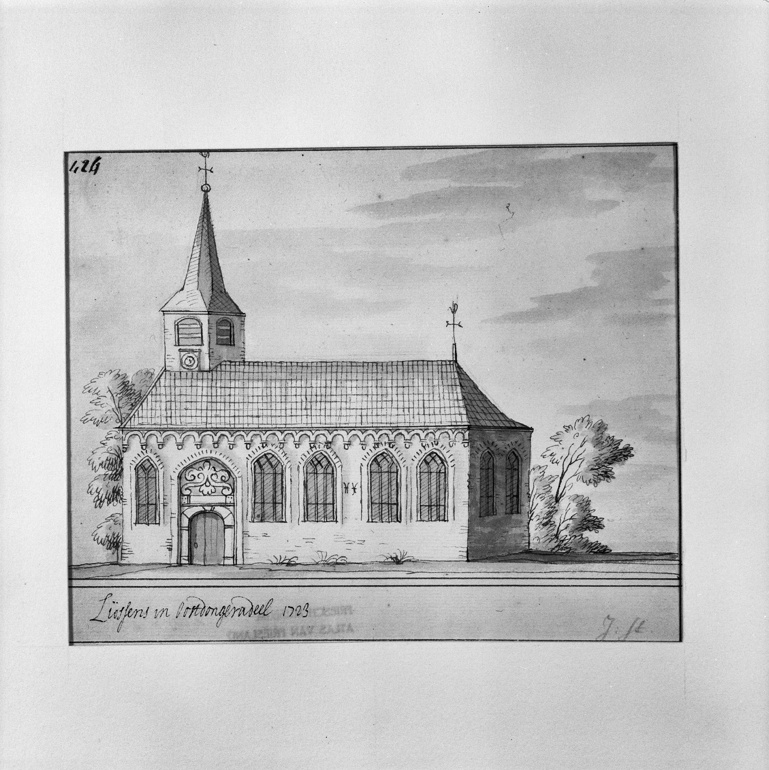 Nederlands Hervormde Kerk: kerk in 1723 tekening Stellingwerf Collectie Fries Museum